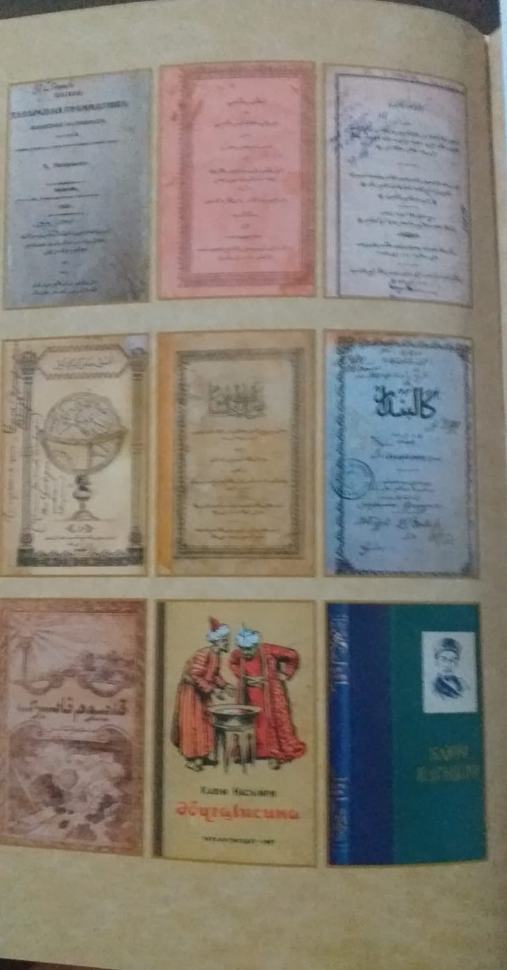 Татарча/tatarça: "Шәхесләребез" сериясенең "Каюм Насыйри" (2017) китабында К. Насыйриның хезмәтләрен күрсәткән сурәт